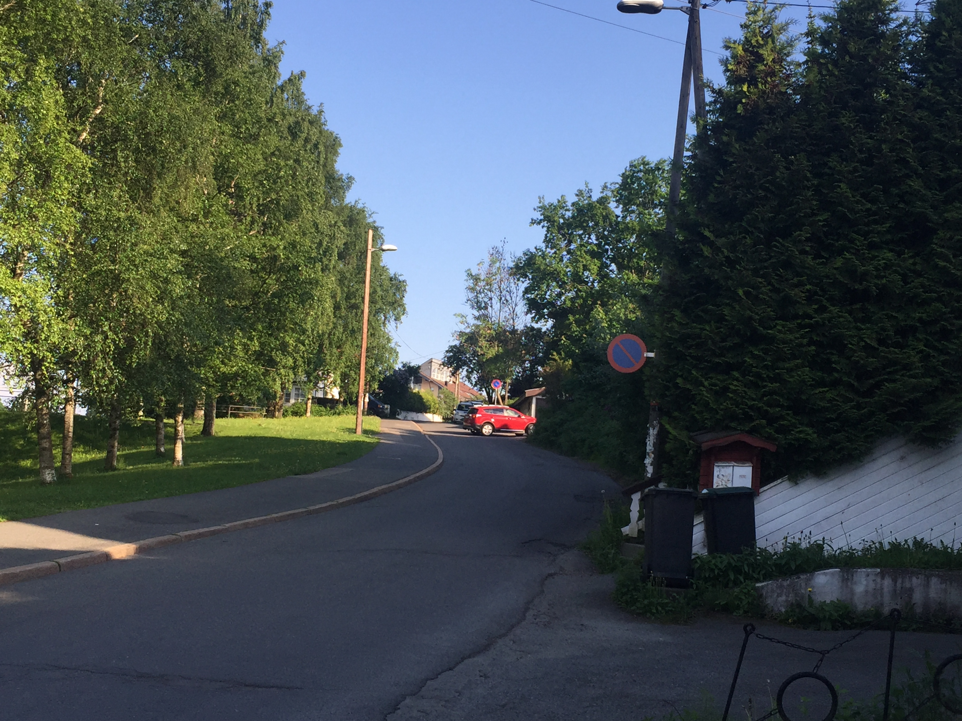 Bekkeveien